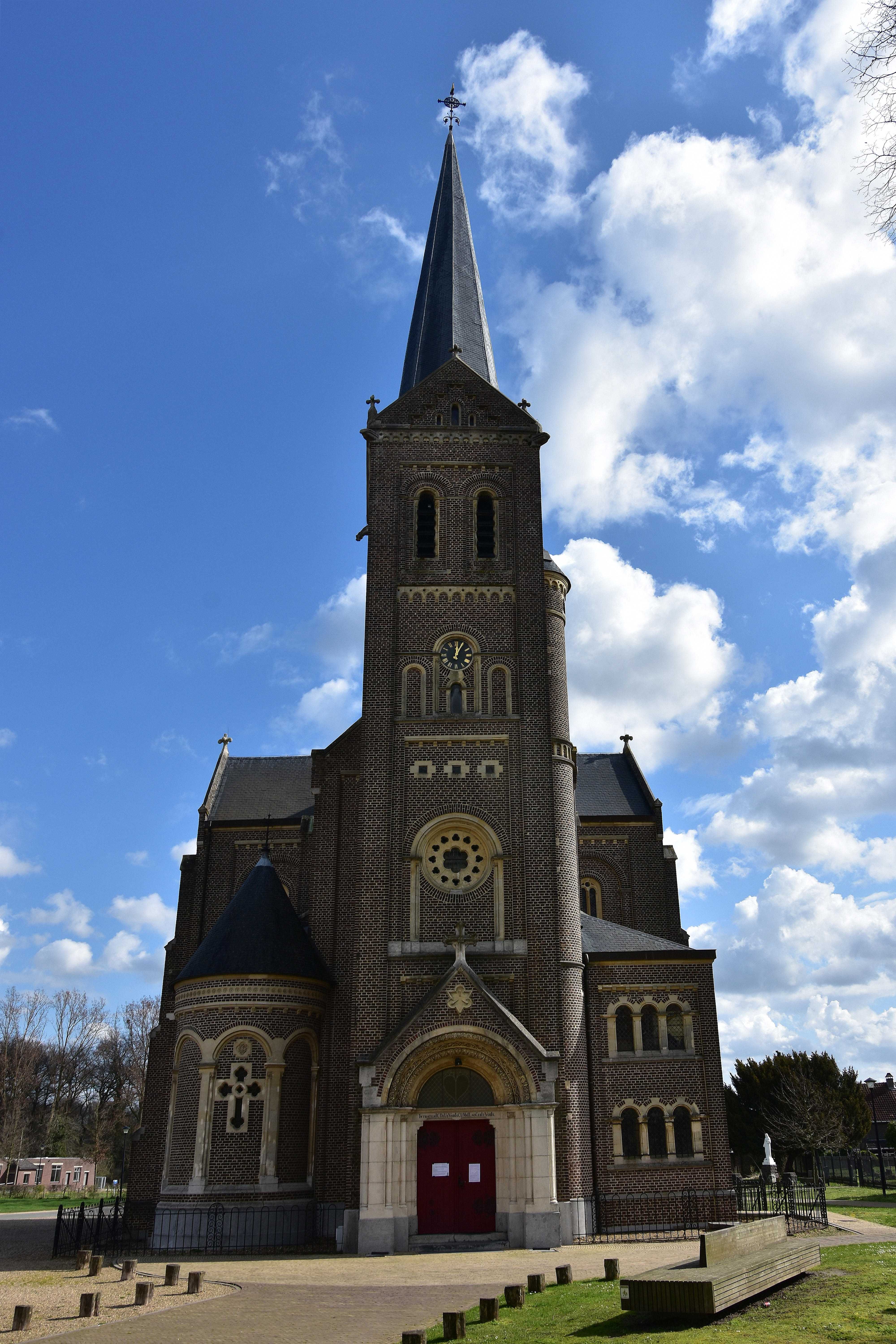 Sint-Pieterskerk (Leut) (1235) 15-03-2020 12-03-37